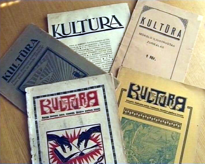 Žurnalai "Kultūra"